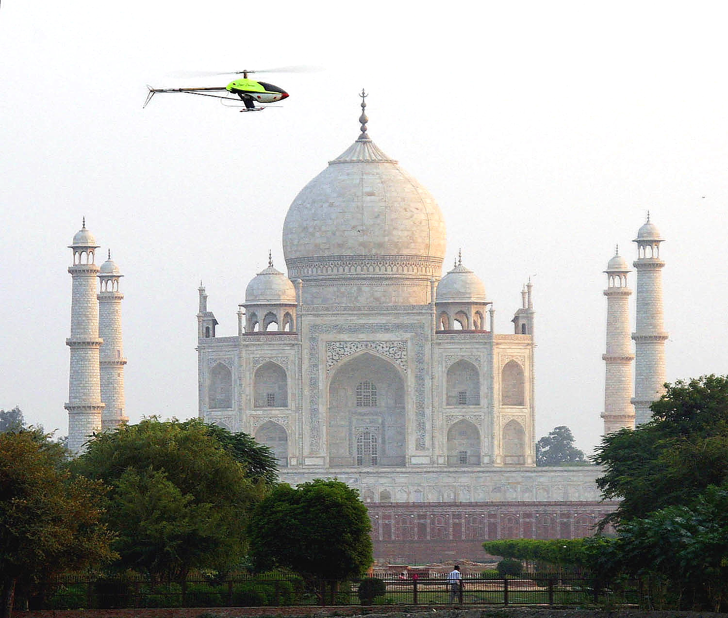 World Scenic Flights in India - World Scenic Flights vor dem Taj Mahal